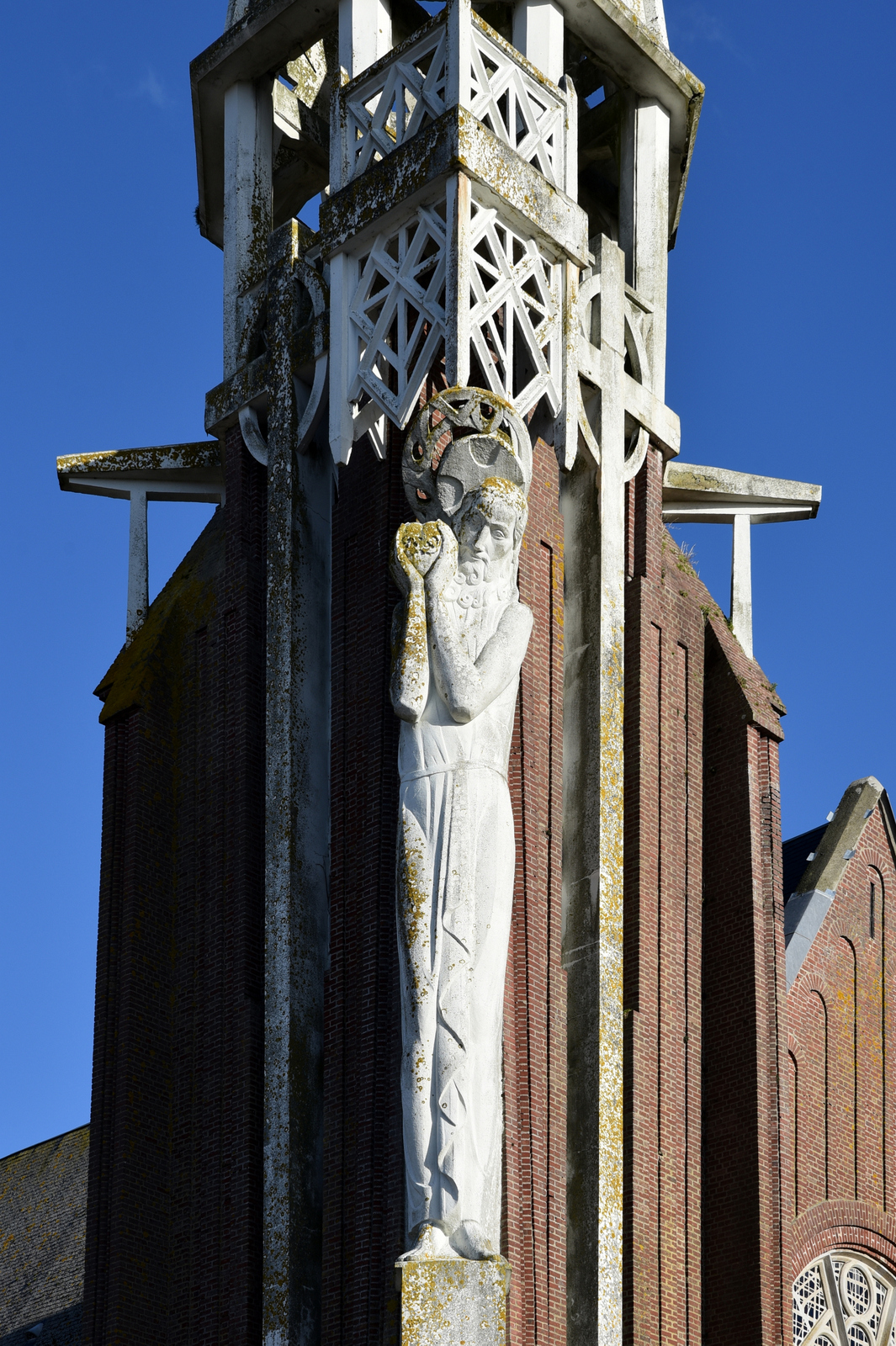 statue